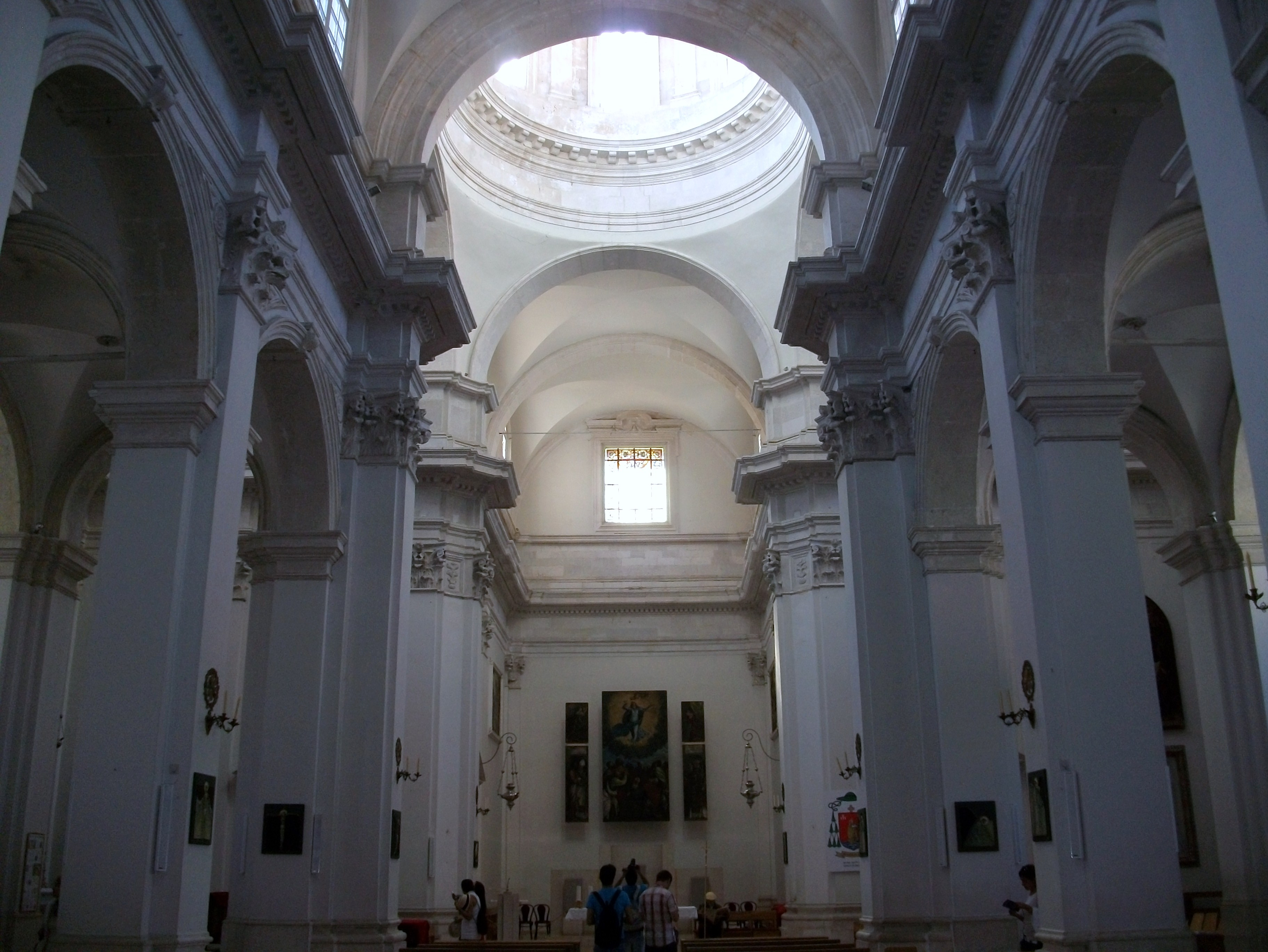 Interior de la catedral de l'Assumpció de Maria, Dubrovnik.